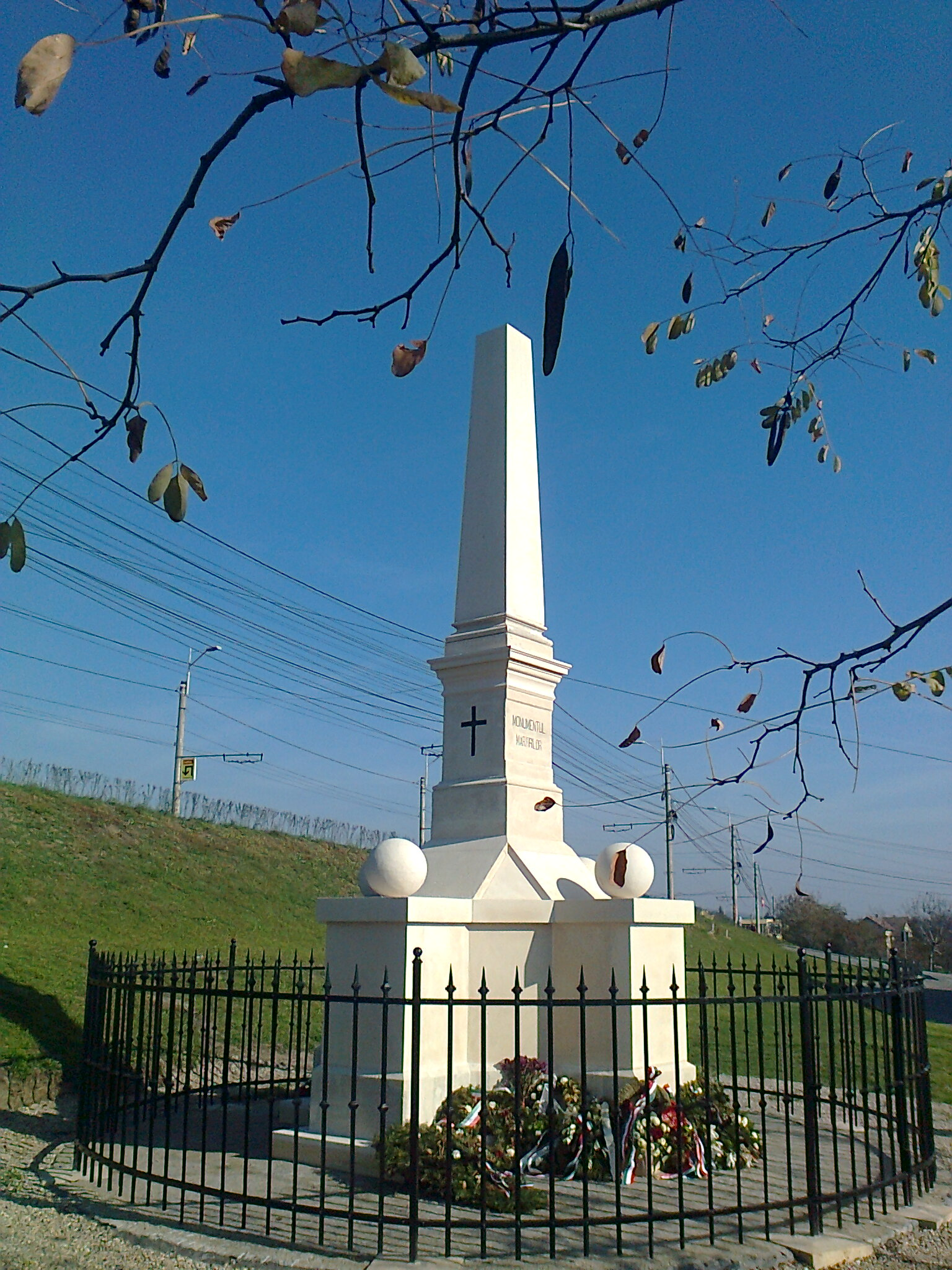 Felújított honvédemlékmű Kolozsvár és Szamosfalva között (2013. október 18-án avatták fel újra)